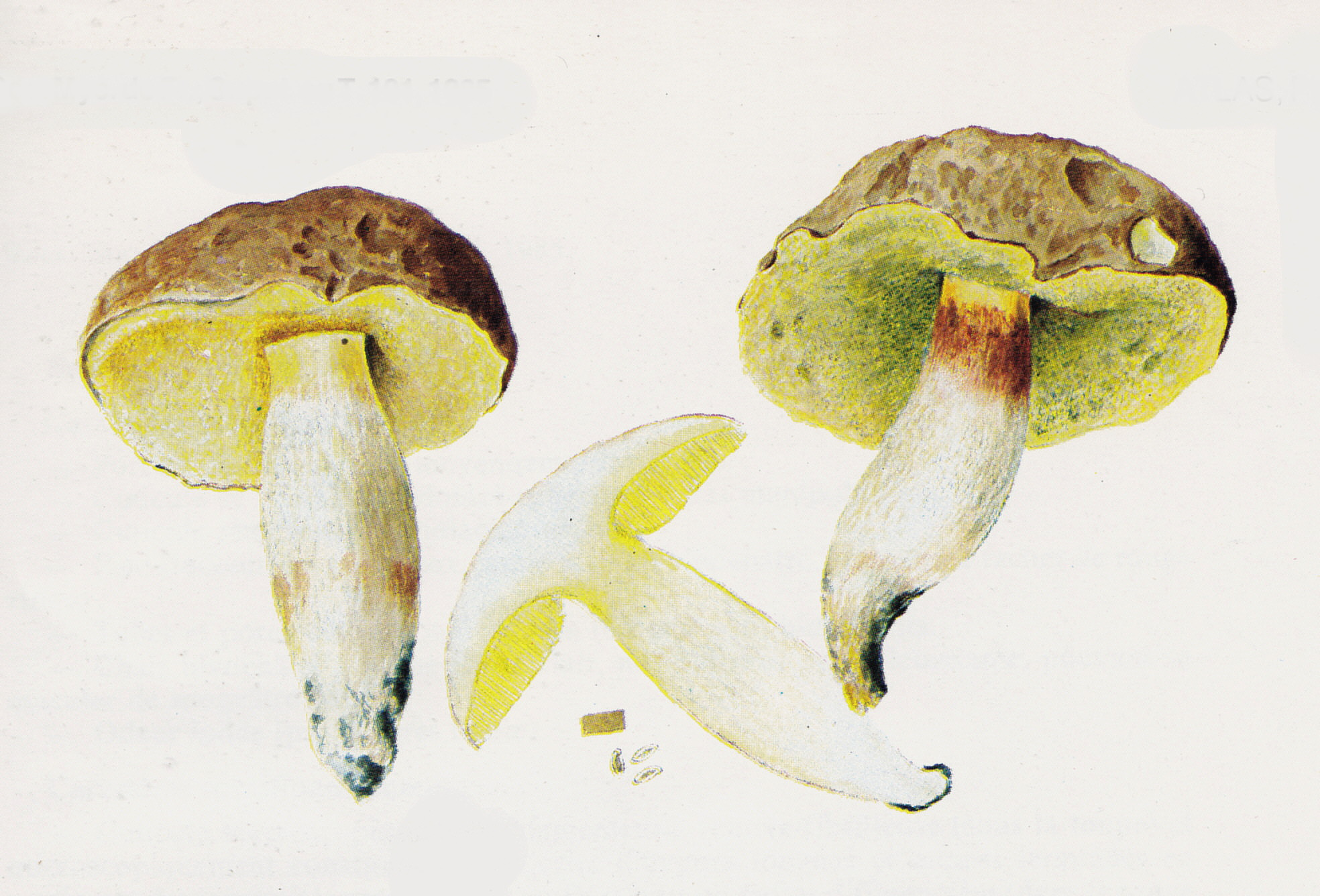 Hemileccinum depilatum (Redeuilh) Šutara (2008)